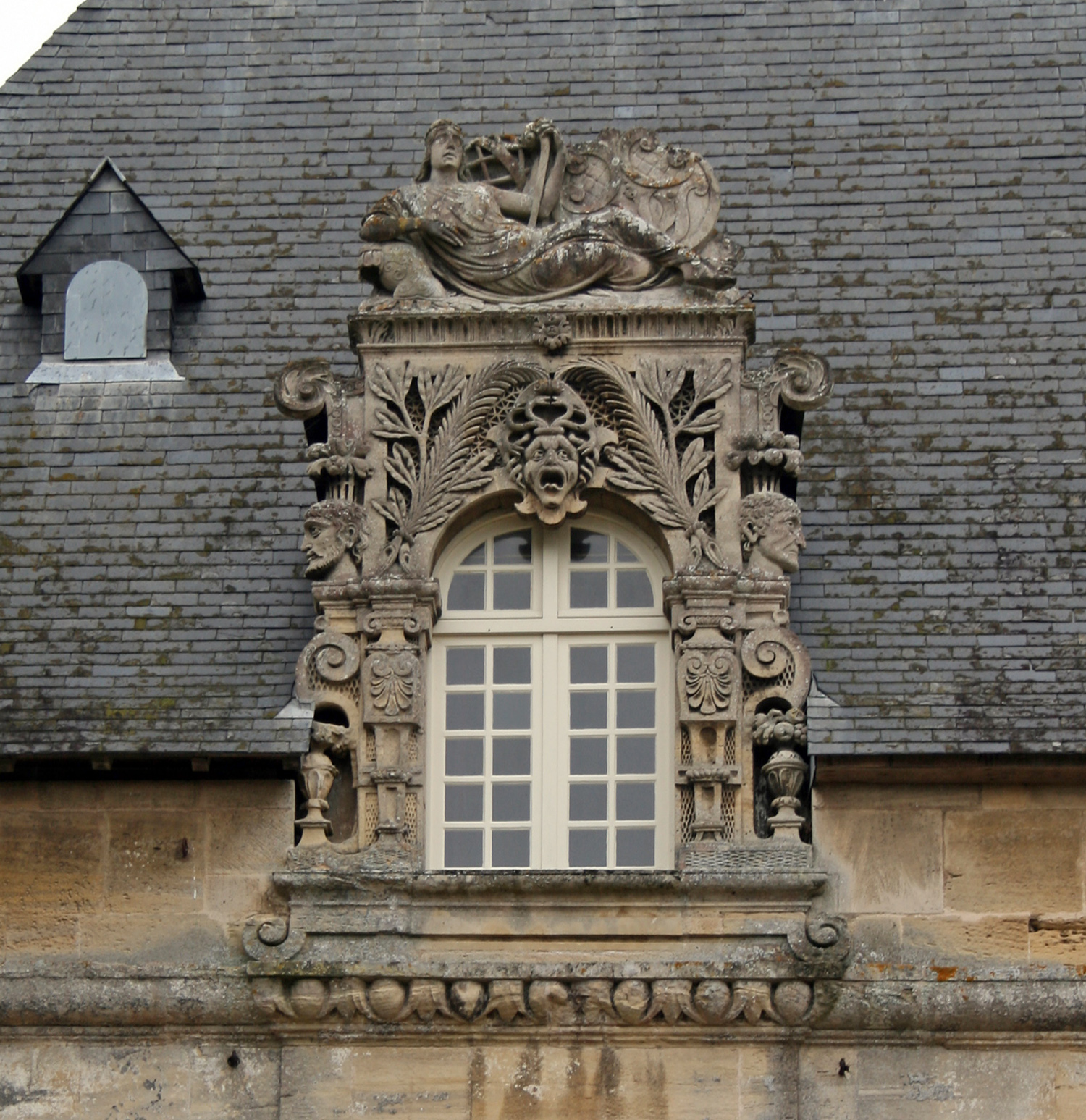 Lucarne du château de Courseulles sur mer